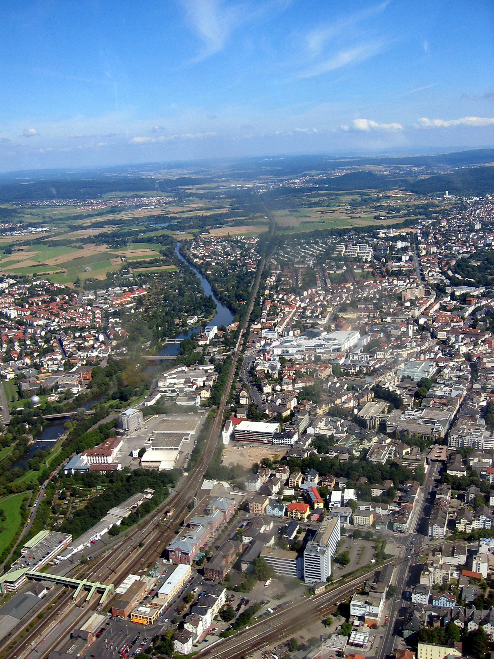 Luftaufnahme eines Teils der Gießener Innenstadt. Links im Bild die Lahn. Aufgenommen am 28.08.2005 ca. um 11:30 Uhr